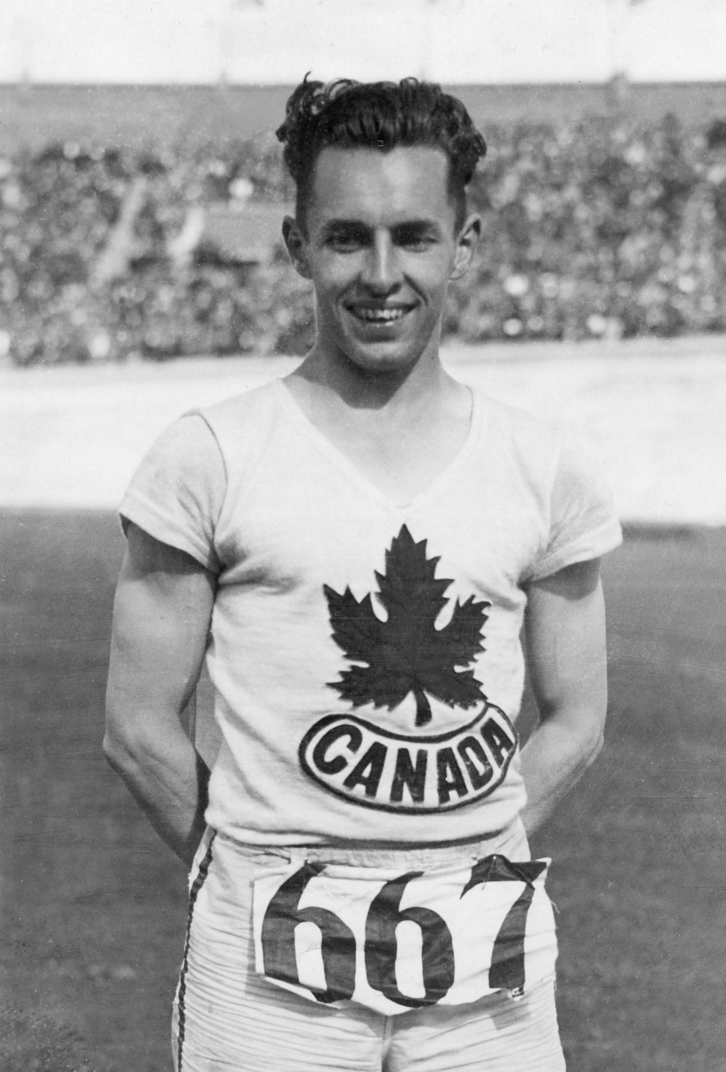 Sport. Olympische Spelen 1928 Amsterdam, Nederland : De Canadees Percy Williams, die zowel de 100 meter als de 200 meter hardlopen won.